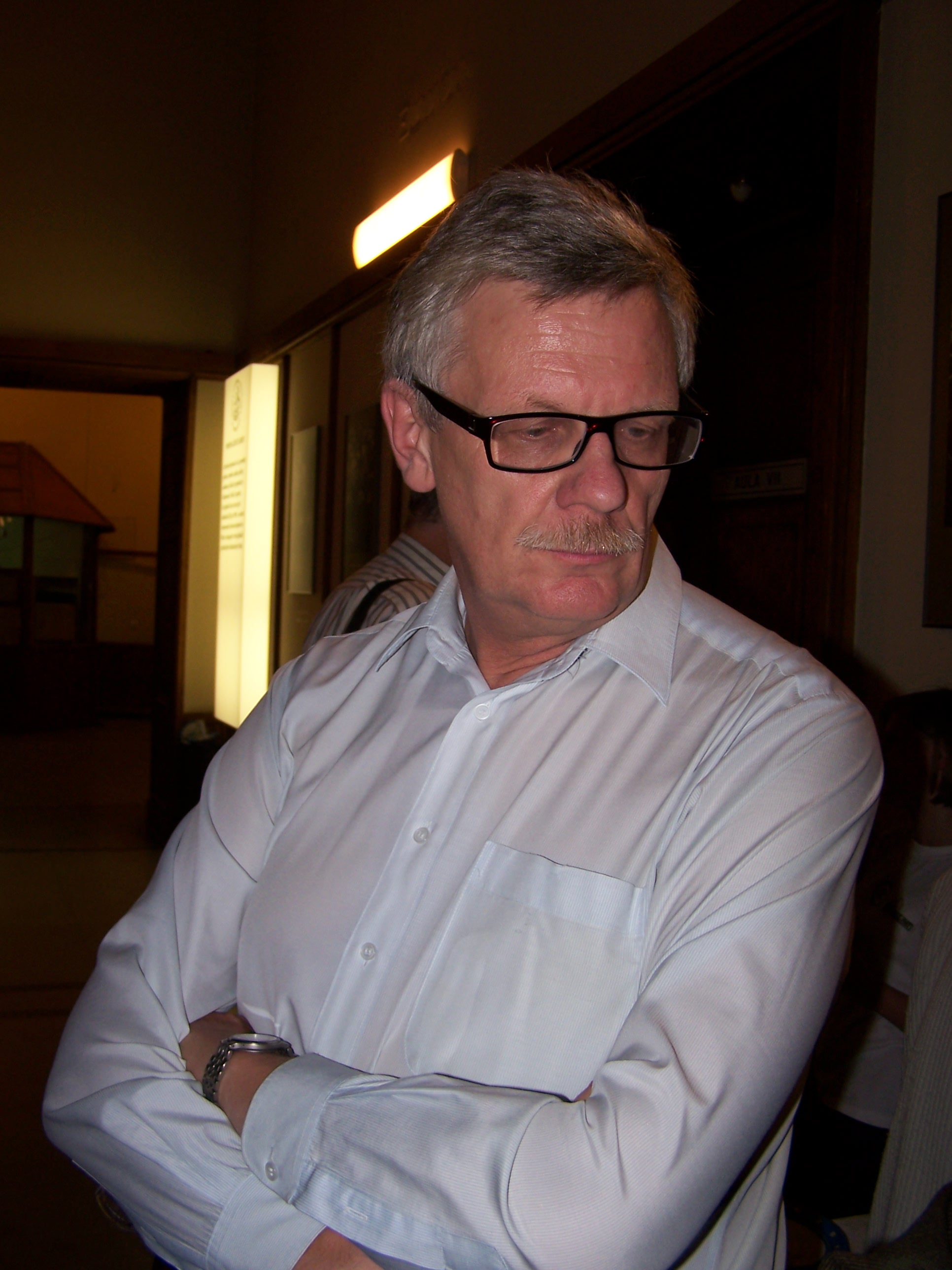 Wikipedysta Drozdp podczas obchodów 5. urodzin polskiej Wikipedii.